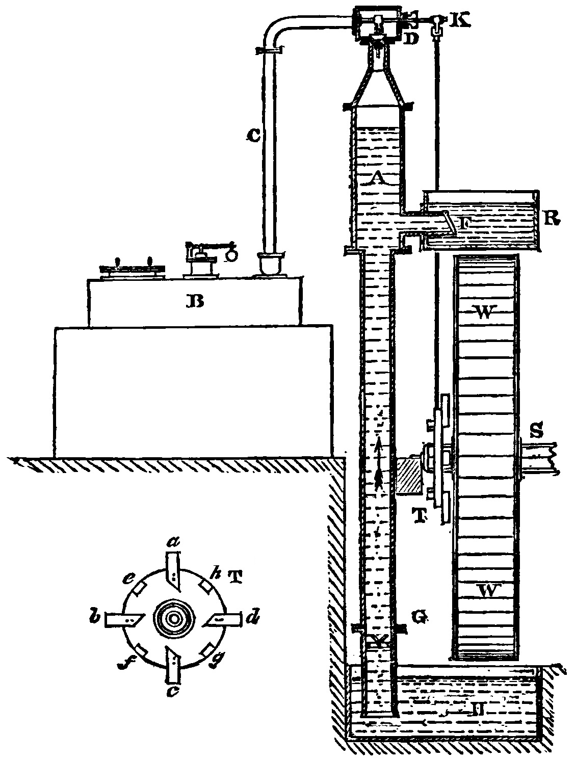 Mr. Kier の大規模工場に建造された、セイヴァリ機関で駆動される水車